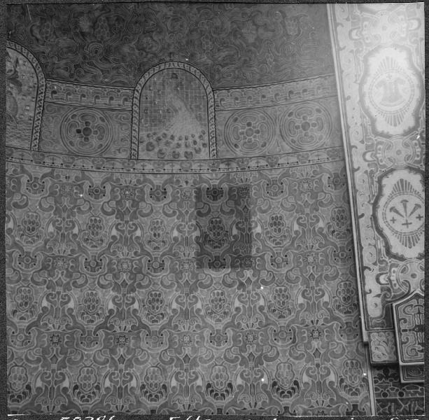 Korabsiden, efter restaureringen. Kategori: (02) InteriörerKorabsiden, efter restaureringen.